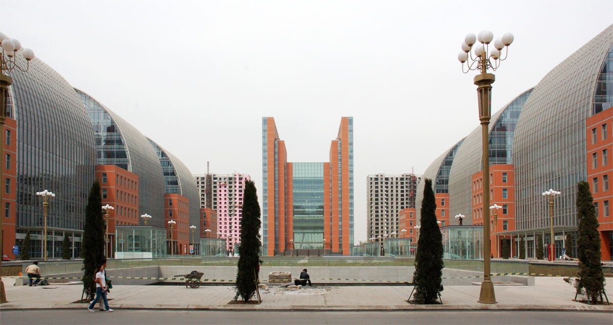 泰达金融街